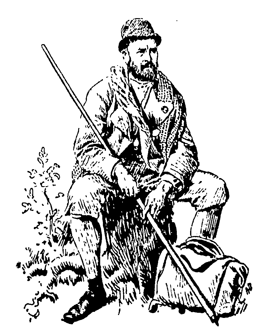 Friluftsmannen Emanuel Mohn